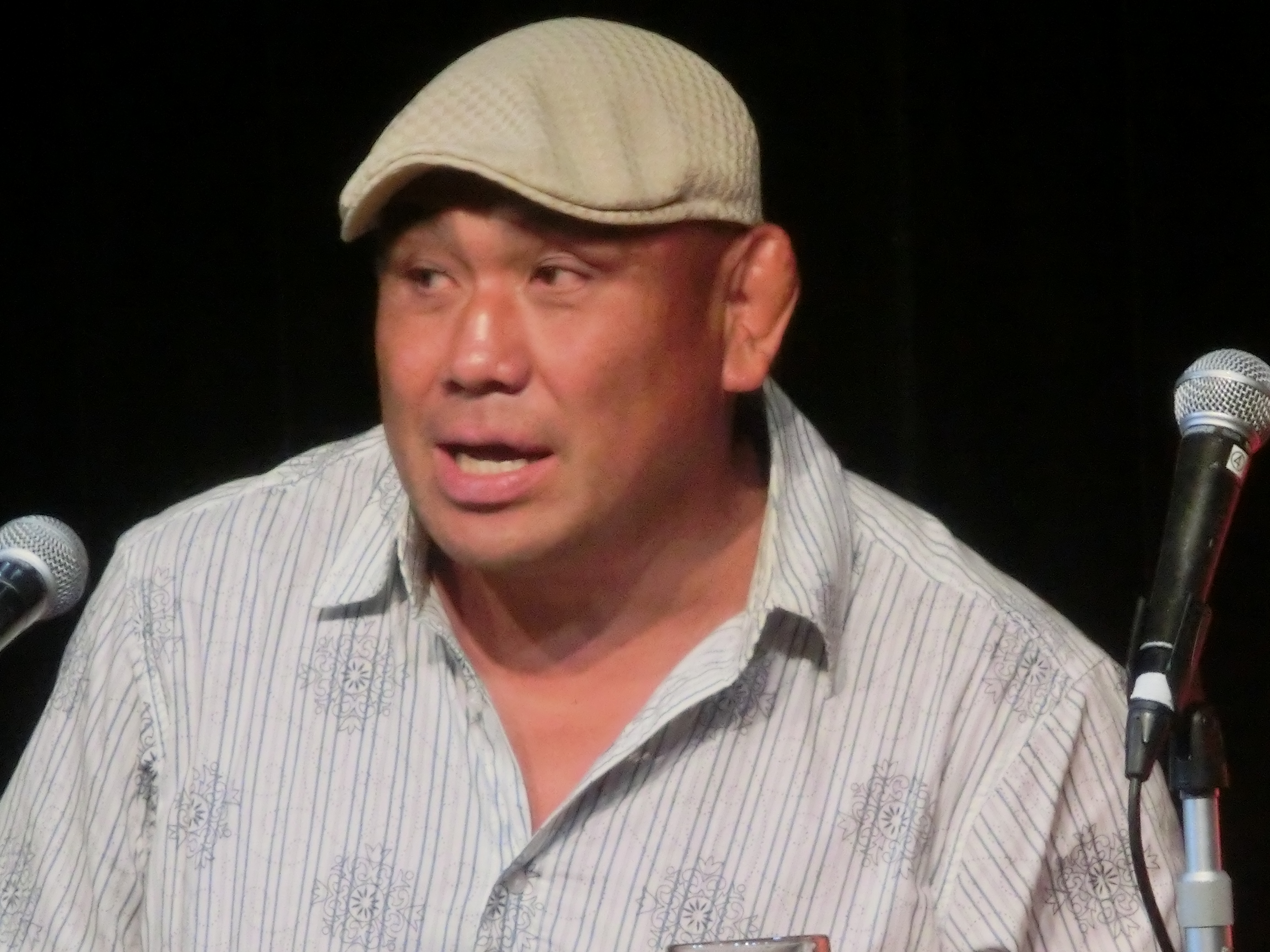 SHIBUYA LOFT9 （2019年7月13日）